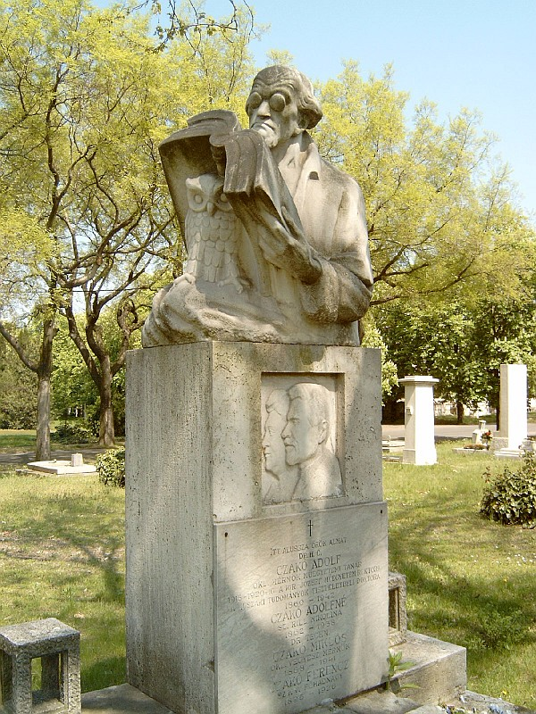 Czakó Adolf, Zwick (Pest, 1860. február 4. – Budapest, 1942. január 28.) mérnök, műegyetemi tanár sírja Budapesten. Kerepesi temető: 11-5-9 [szobrász: Bory Jenő]